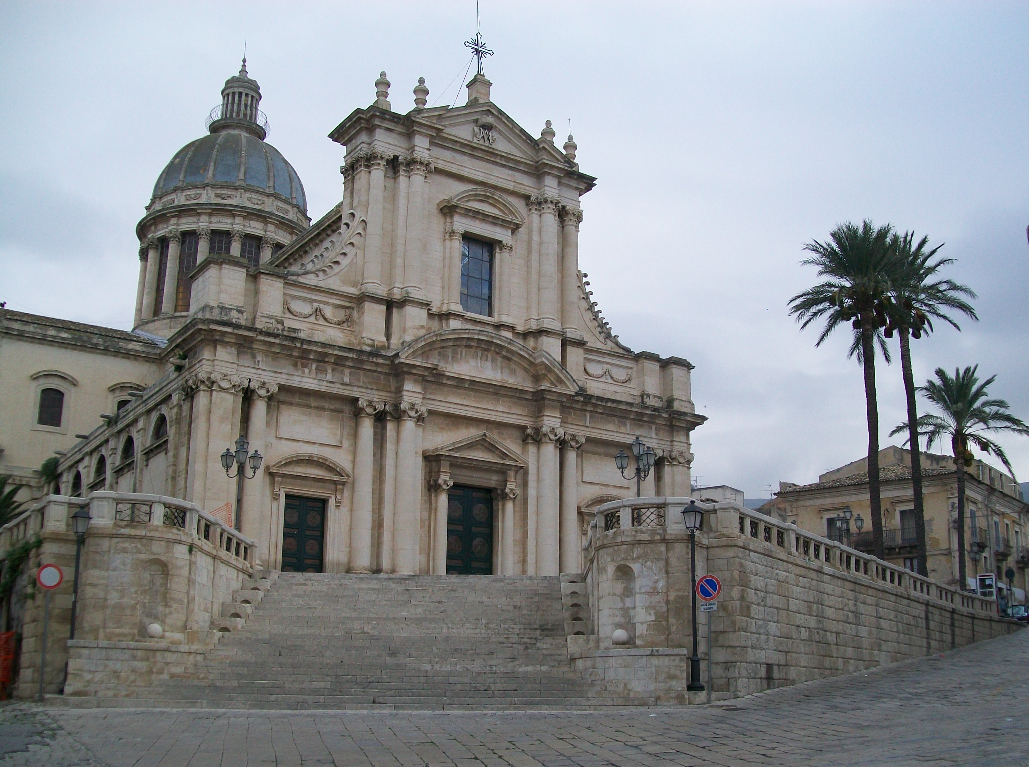 Facciata della Basilica M. SS. Annunziata di Comiso